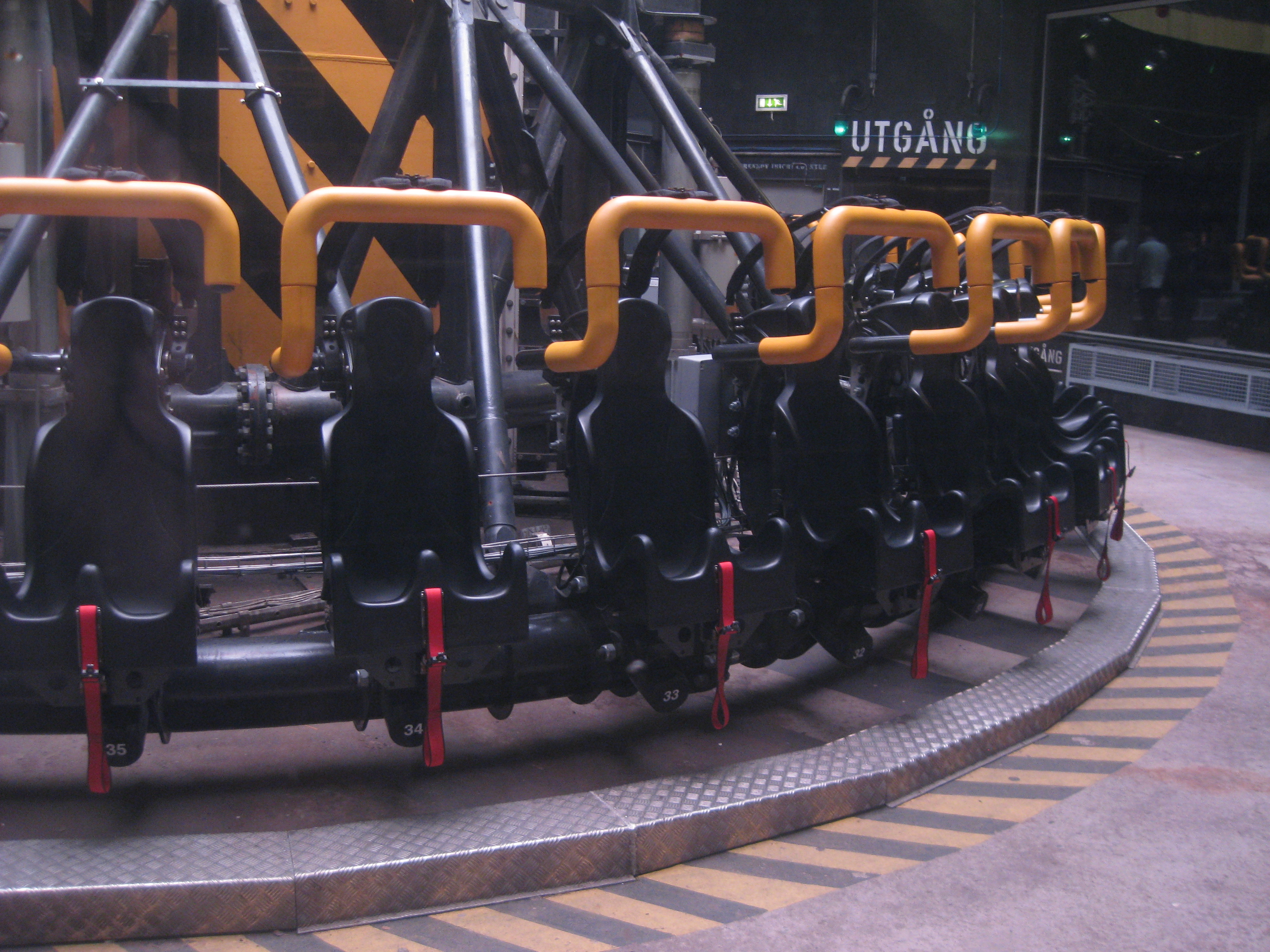 Atmosfear, Liseberg, juni 2012.